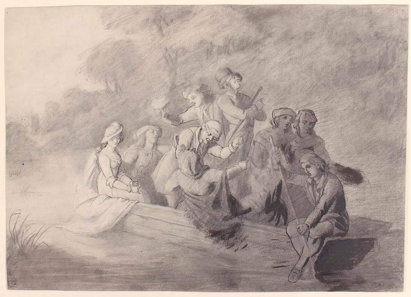 Bleistift- und Tuschezeichnung des Malers Ernst Ludolf Meyer auf festem Papier, circa 22 x 31 cm (Blattgröße), verso mit Stempel der Sammlung G+W D. Das Blatt wurde unter Passepartout montiert, wo sich der Sammlungsstempel 'Dr.F.W.Denzel' findet. Dieses während einer Auktion am 19. Februar 2016 vom Antiquariat Peter Kiefer in Pforzheim angebotene Stück wurde mit zwei weiteren Blättern des Künstlers (Entwurfszeichungen) und einem ähnlich aufgebrachten Sammlungsstempel angeboten, darunter kleine Personengruppen ...